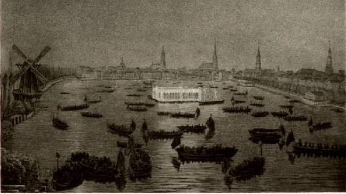 Sog. Feenpavillion auf der Binnenalster, mit Kerzen illuminierter Veranstaltungsort eines nächtlichen Konzerts im Rahmen des in Hamburg stattfindenden Dritten Norddeutschen Musikfestes 1841